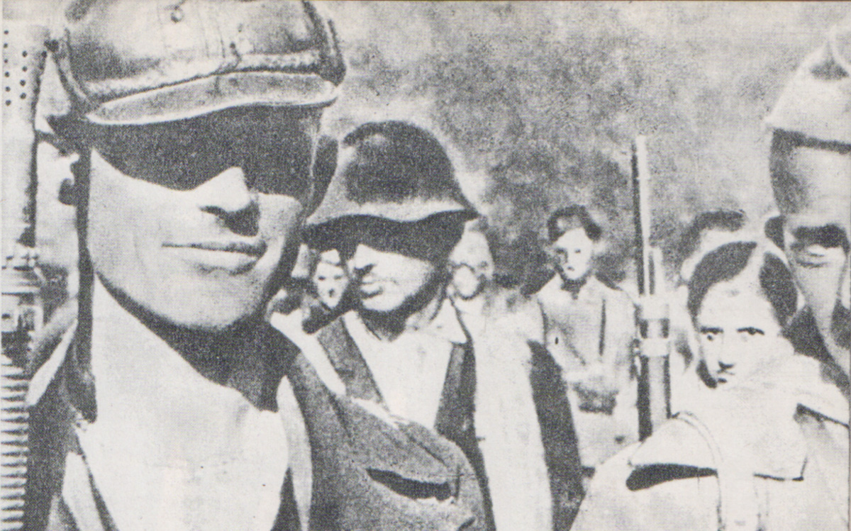 Srpskohrvatski / српскохрватски: Borci Pete kozarske brigade